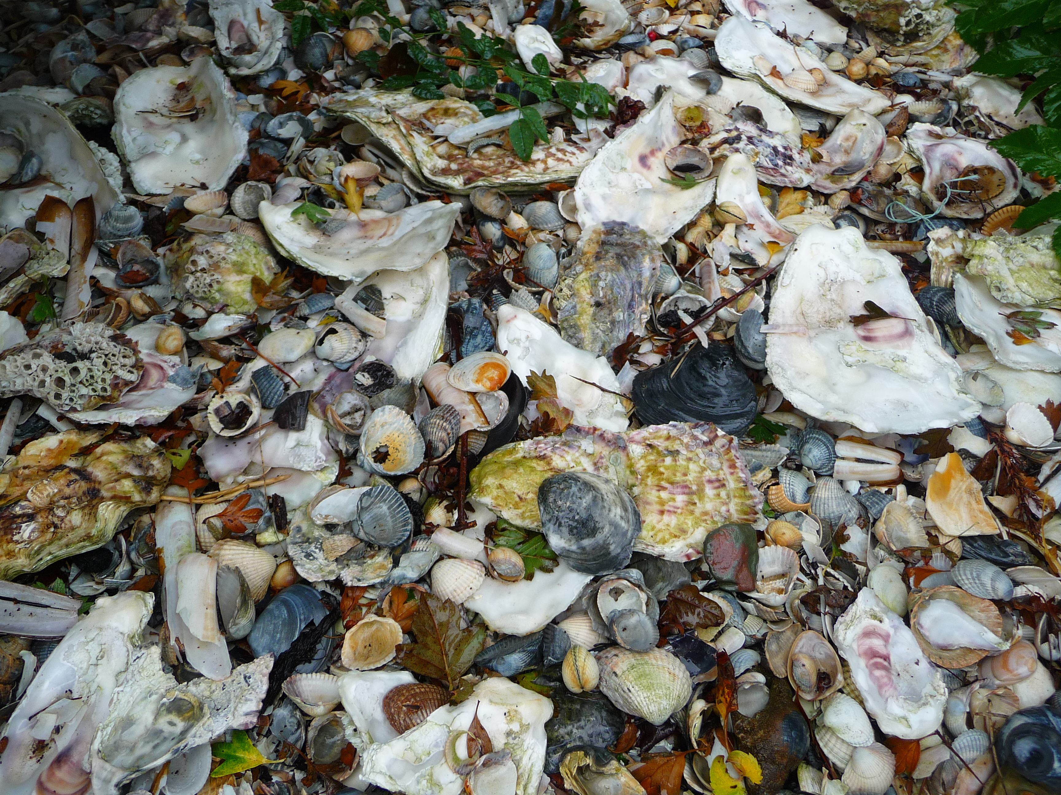 Strandfunde als Schmuck auf dem Grab von Fritz Hafner (Maler, Kunsterzieher, Leiter des Küstenmuseums) auf dem Dünenfriedhof der ostfriesischen Nordseeinsel Juist (Niedersachsen, Deutschland)